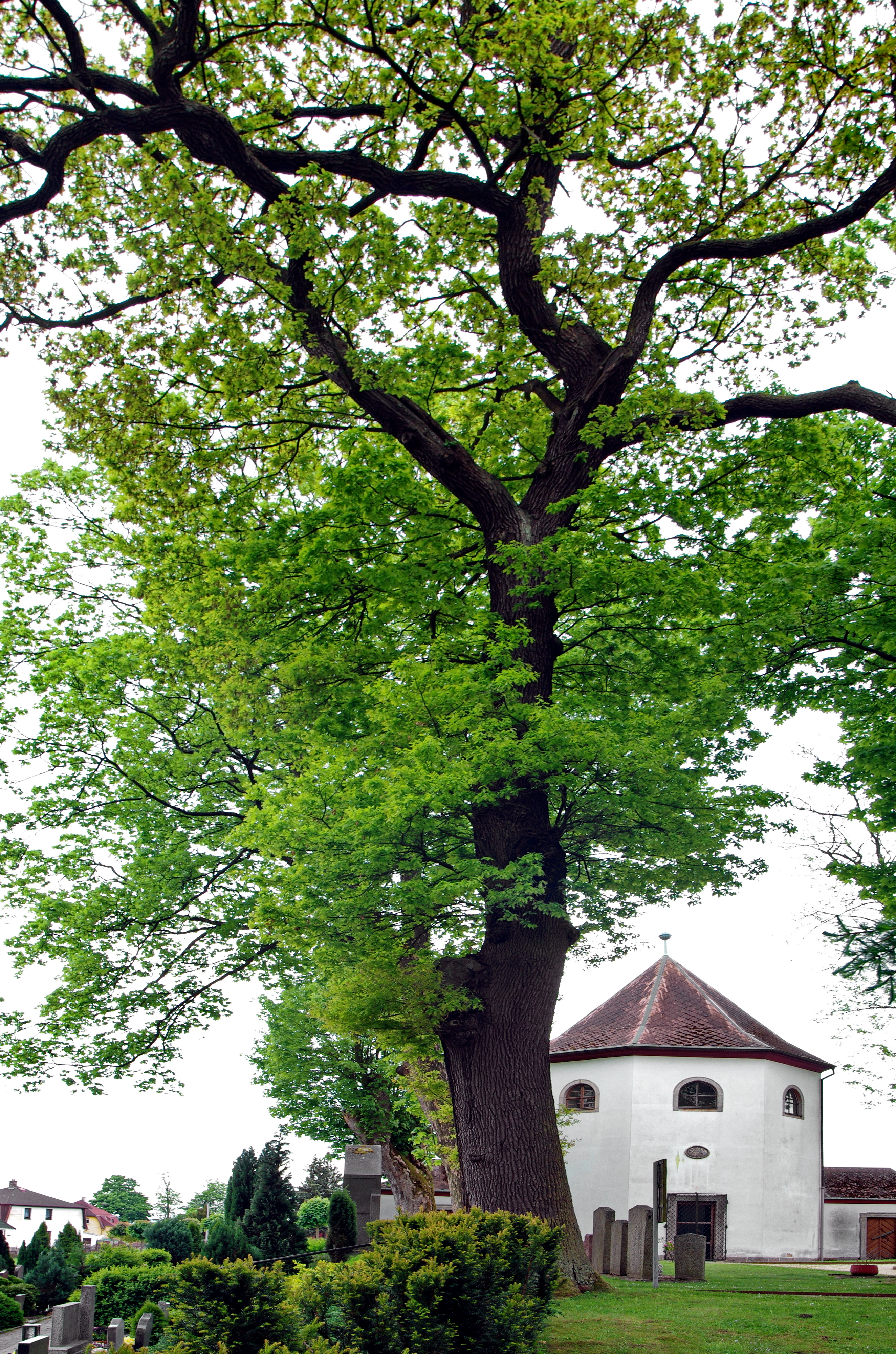 Památný strom Duby u kaple, jediný přeživší z trojice památných stromů, Luby, okres Cheb